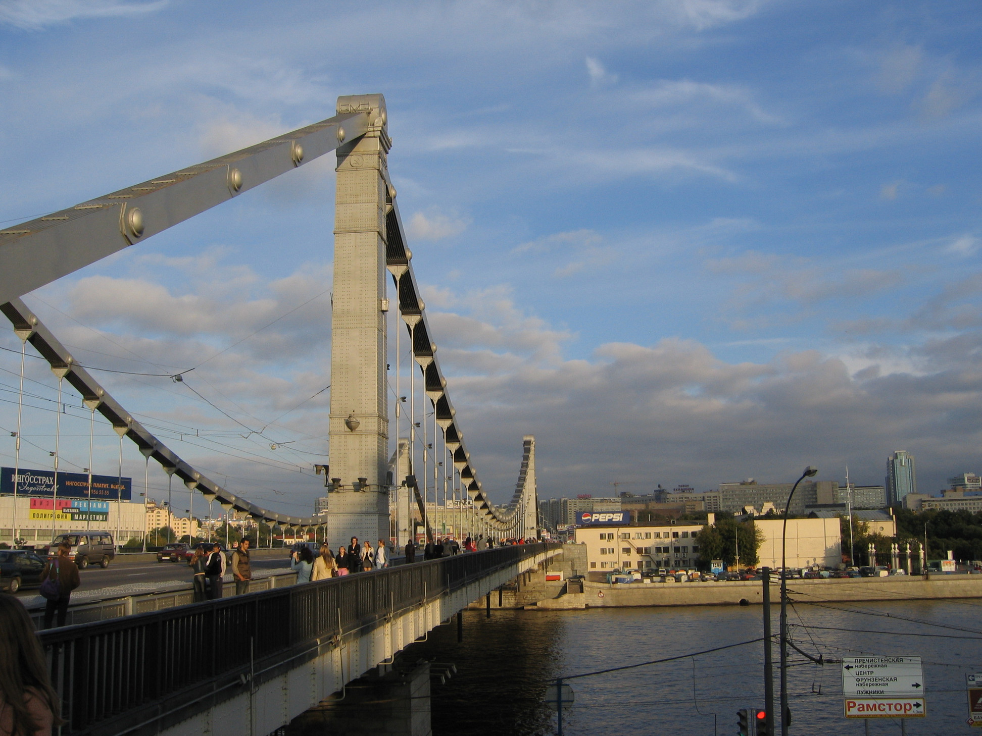 Р. Крымский мост. Вид на Крымский мост со стороны Замоскворечья.